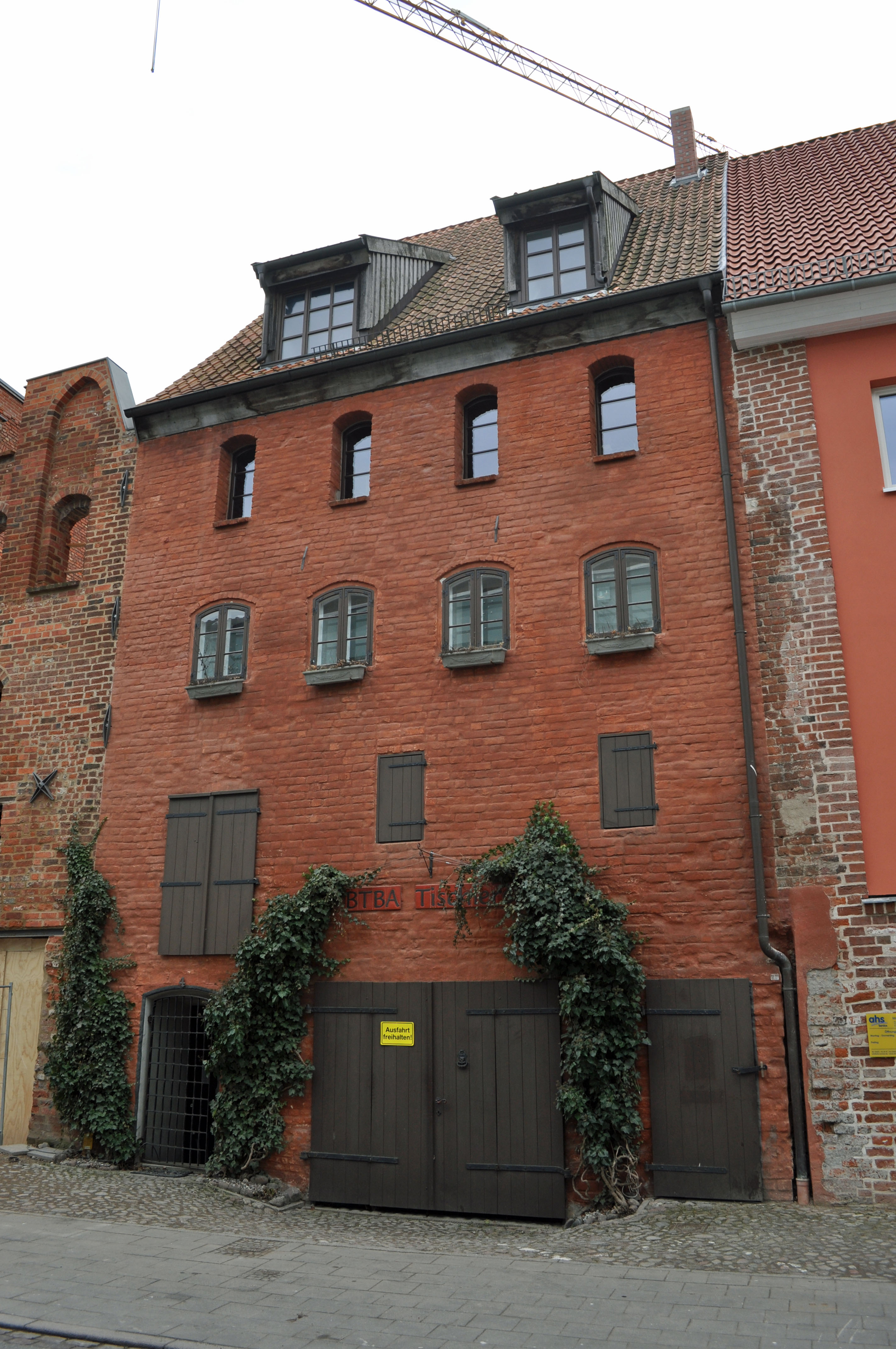 Gebäude bzw. Gebäudedetail in Stralsund. Straße und Hausnummer siehe Dateiname.